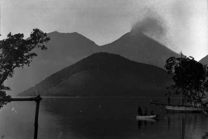 Foto. Gezicht op het eiland Konga en de dubbele vulkaan Lewotobi, die bestaat uit de Perampuan en de Laki-Laki